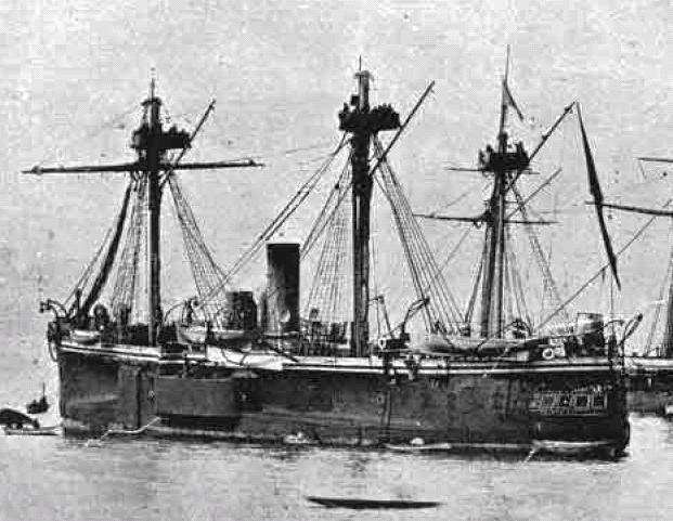 Fragata blindada chilena Almirante Cochrane